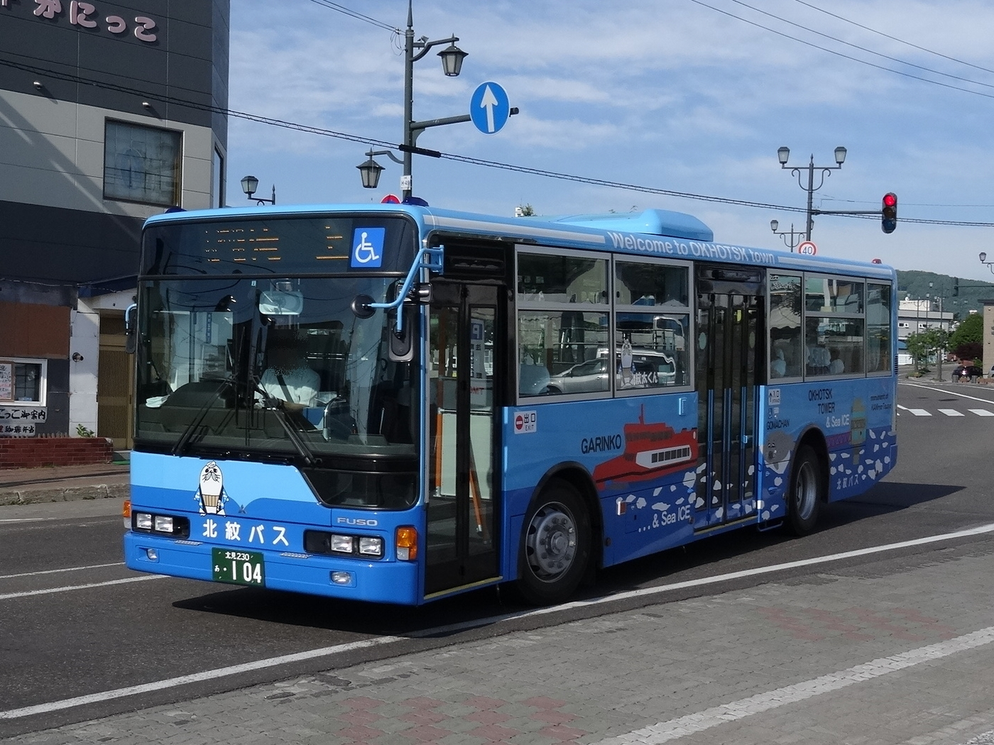 Monbetsu to Takinoue